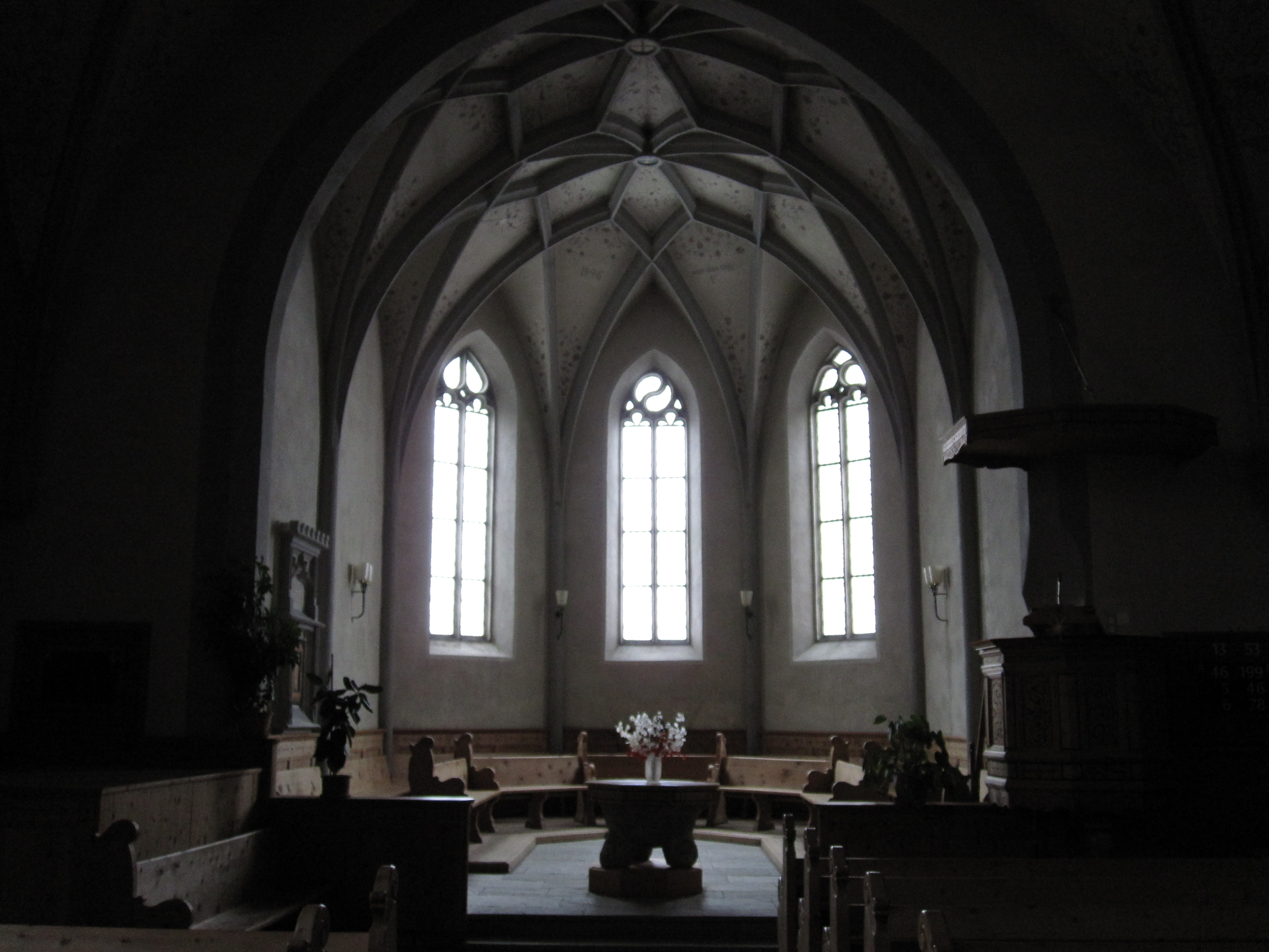 reformierte Kirche in Sent, Chorraum